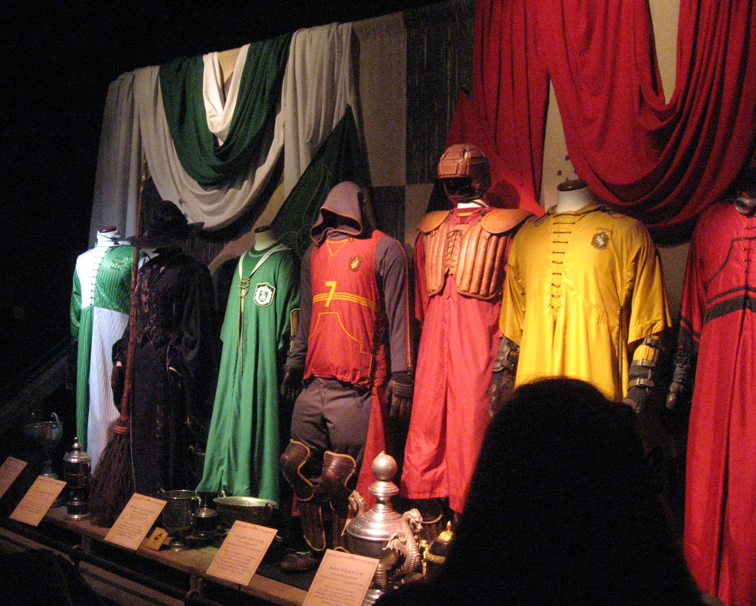 Tenues de Quidditch, Harry Potter Exhibition, Cité du Cinéma, Saint Denis (Paris) avril 2015